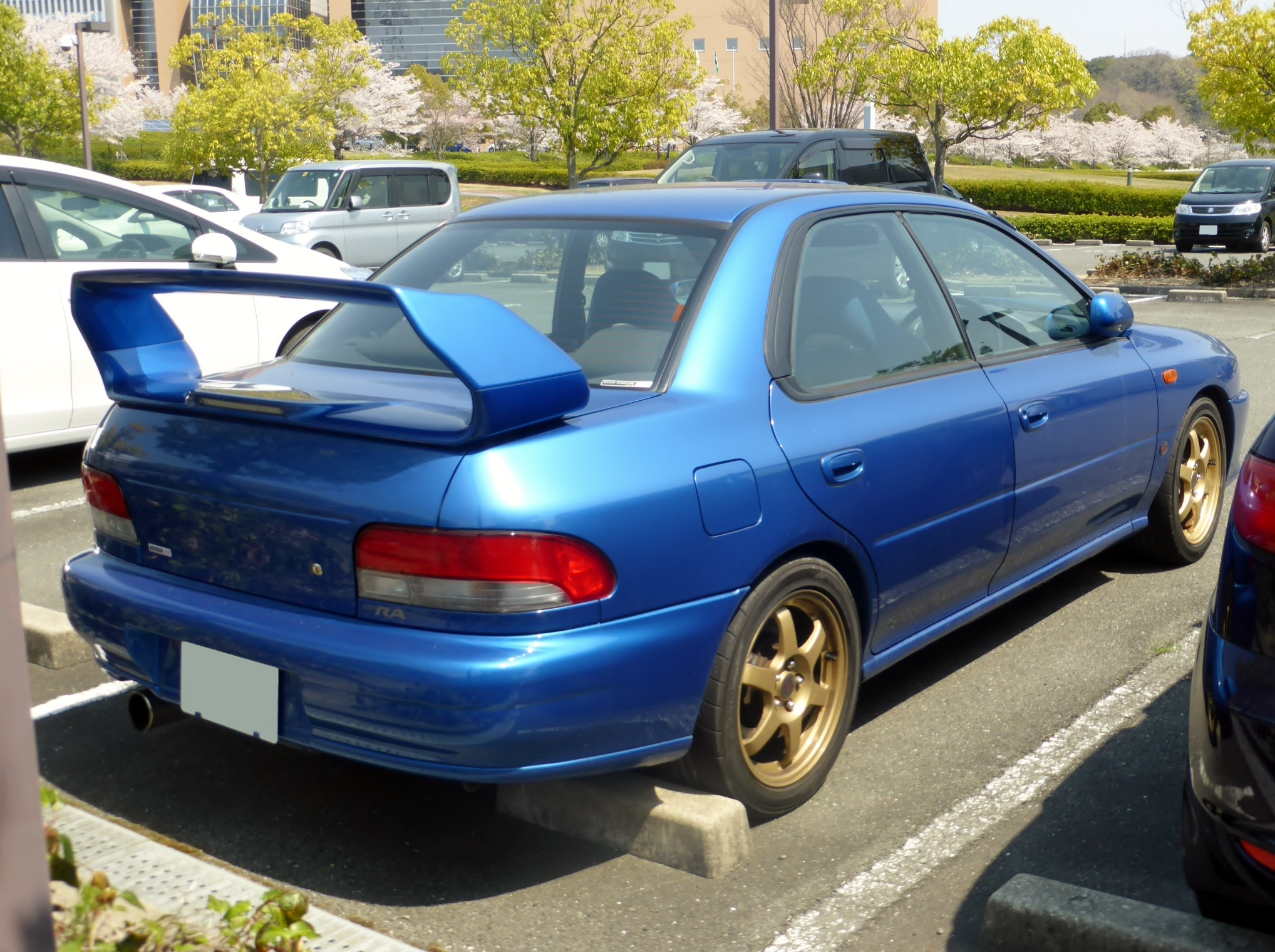 GC型スバル・インプレッサWRXタイプRA STiをリアから撮影。